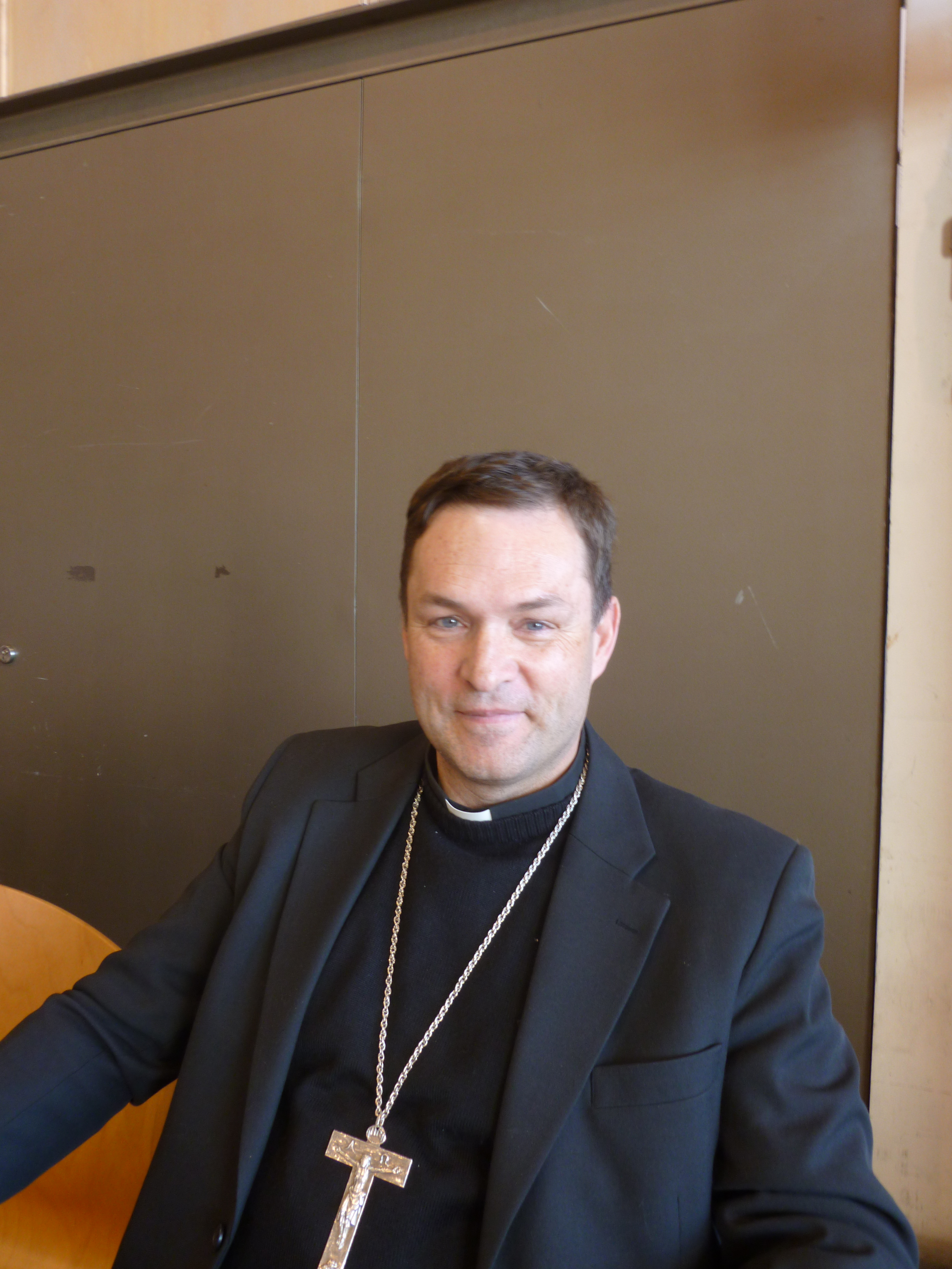 Monseñor Raúl Berzosa durante la comida del Encuentro Diocesano de la Diócesis de Segorbe-Castellón de 2013 en el Auditorio de Castellón de la Plana.